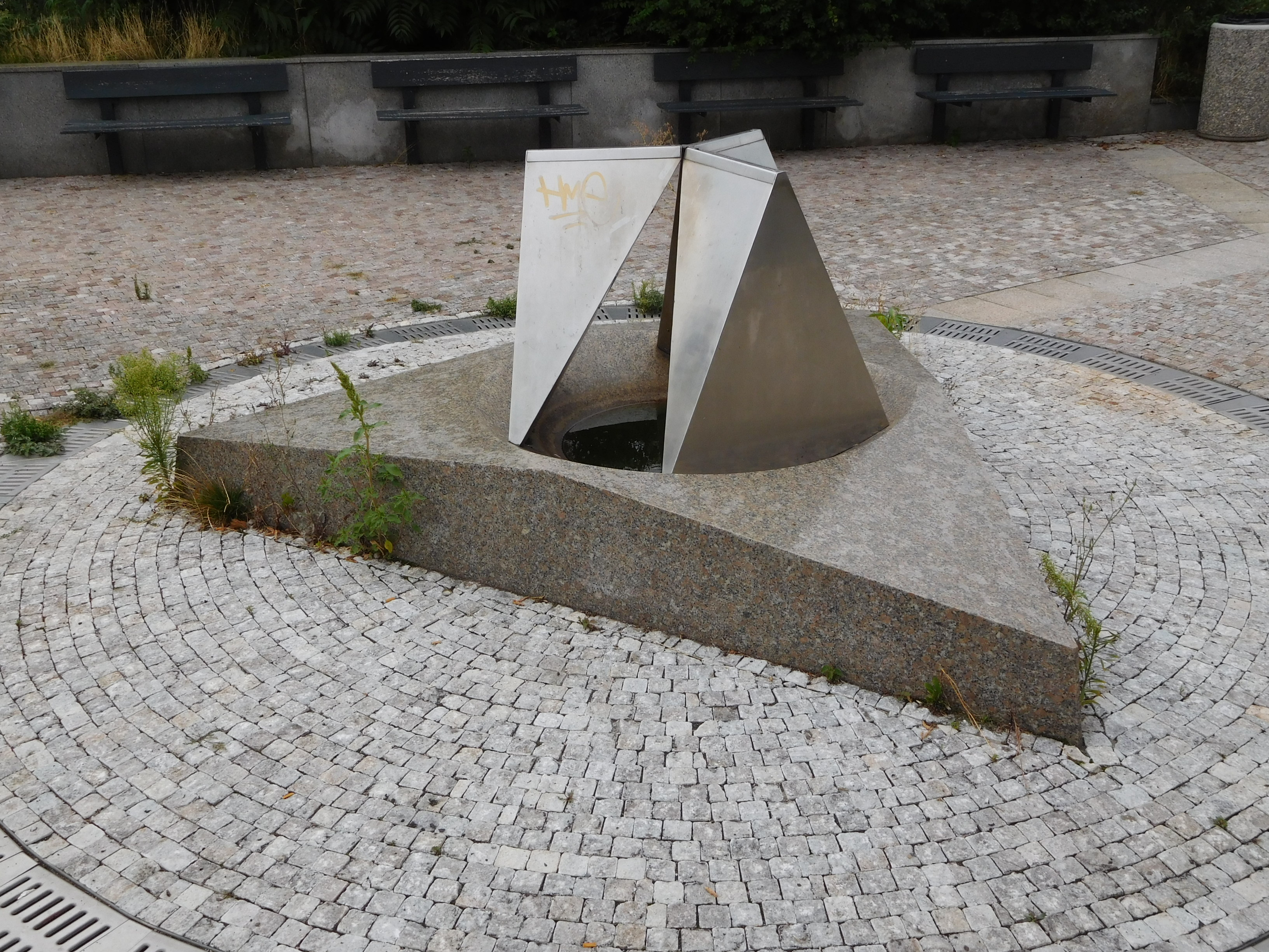 Praha - Strašnice, Goyova, fontána